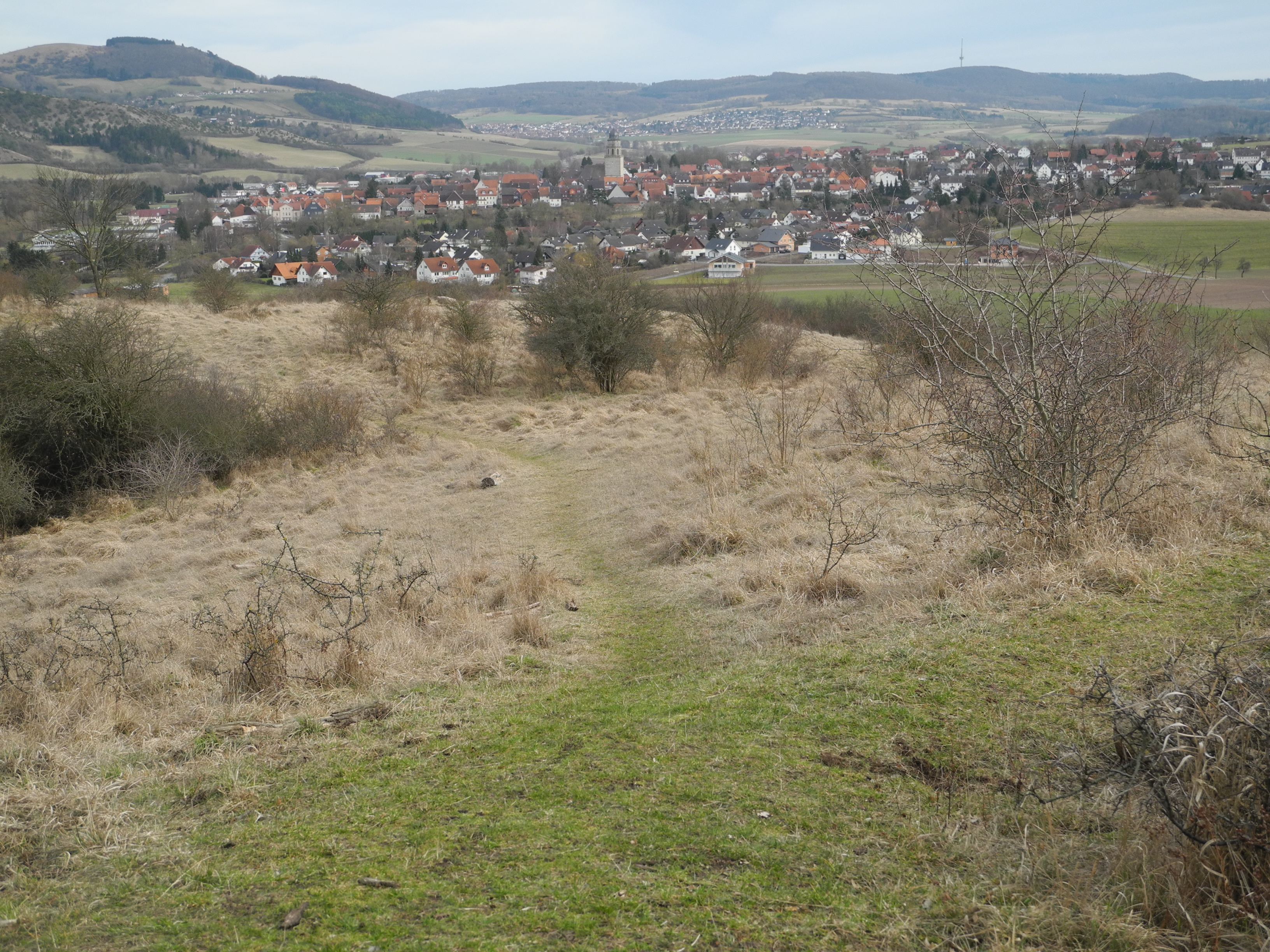 Flächenhaftes Naturdenkmal im Landkreis Kassel 6.33.916. „Basaltkuppe Die Warte“ nordwestlich von Zierenberg.